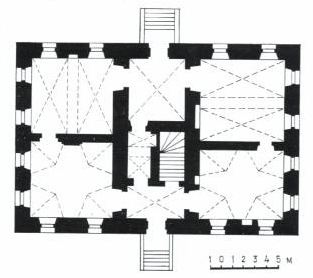 План 1-га паверха дома купца Анташкевіча (Ленінская, 37)